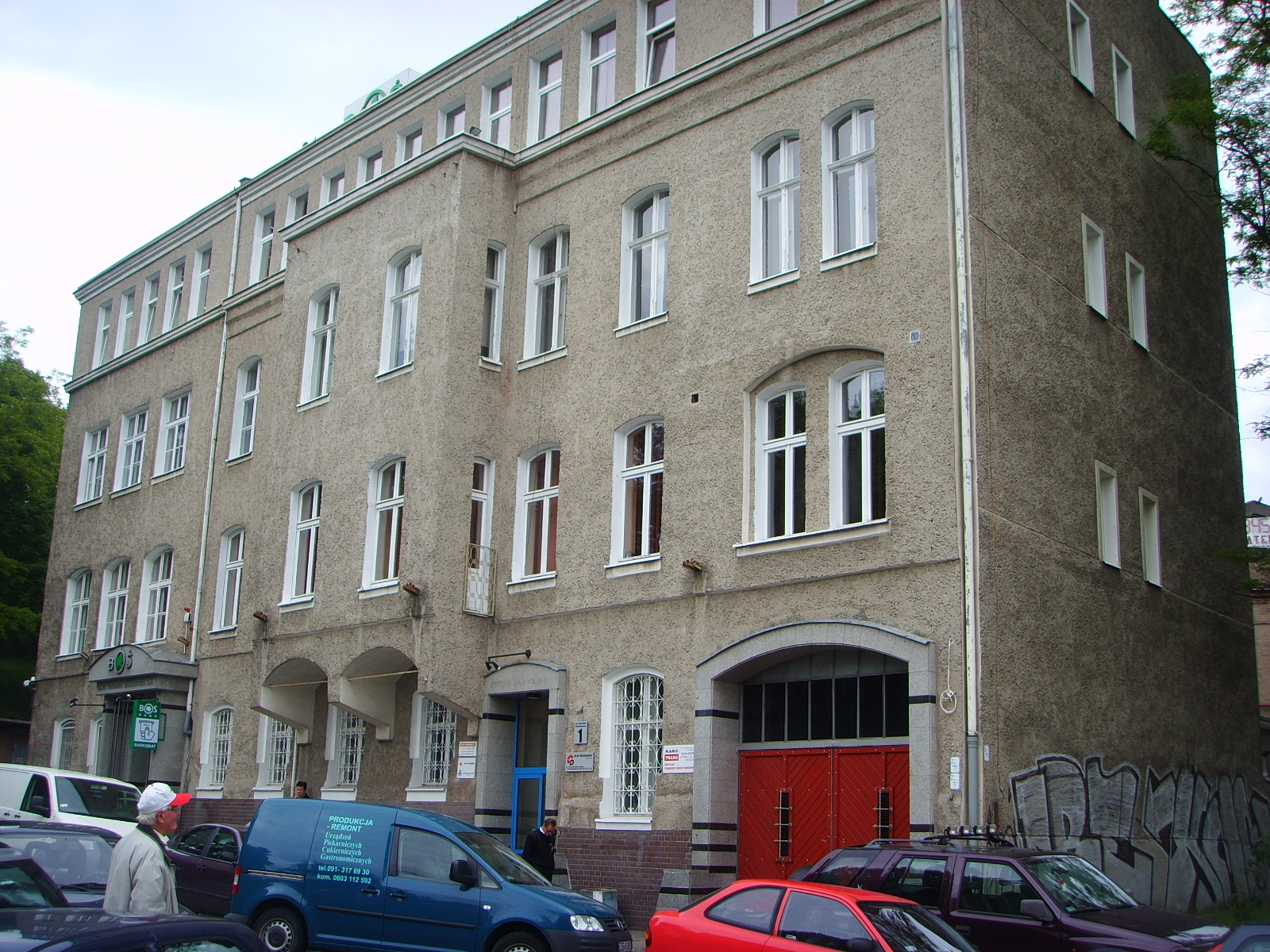 Szczecin, ulica Storrady 1 - pierwsza siedziba sztabu batalionu portowego WOP w Szczecinie